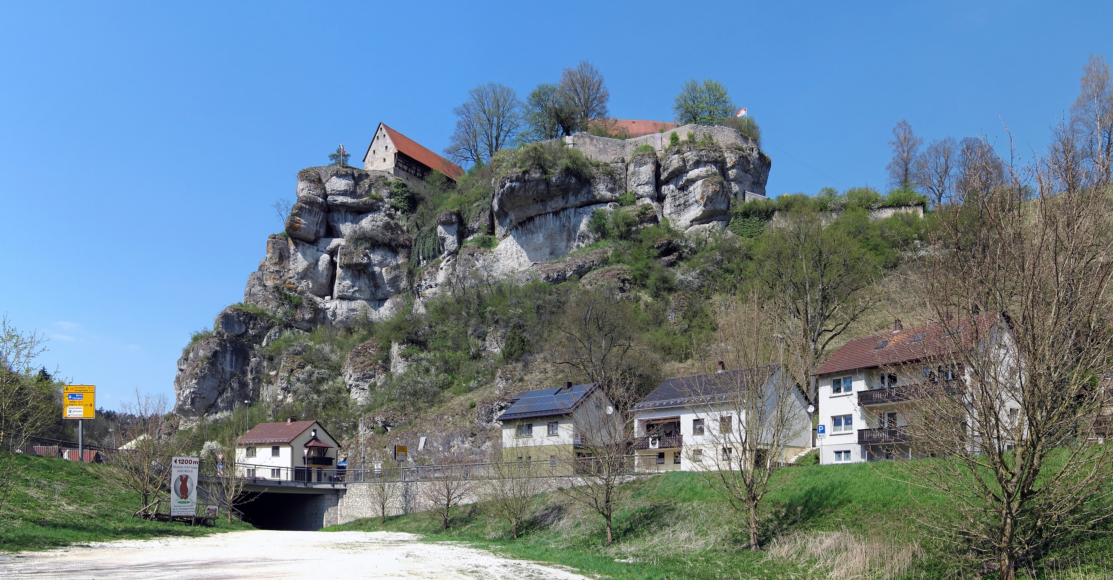 Burg Pottenstein